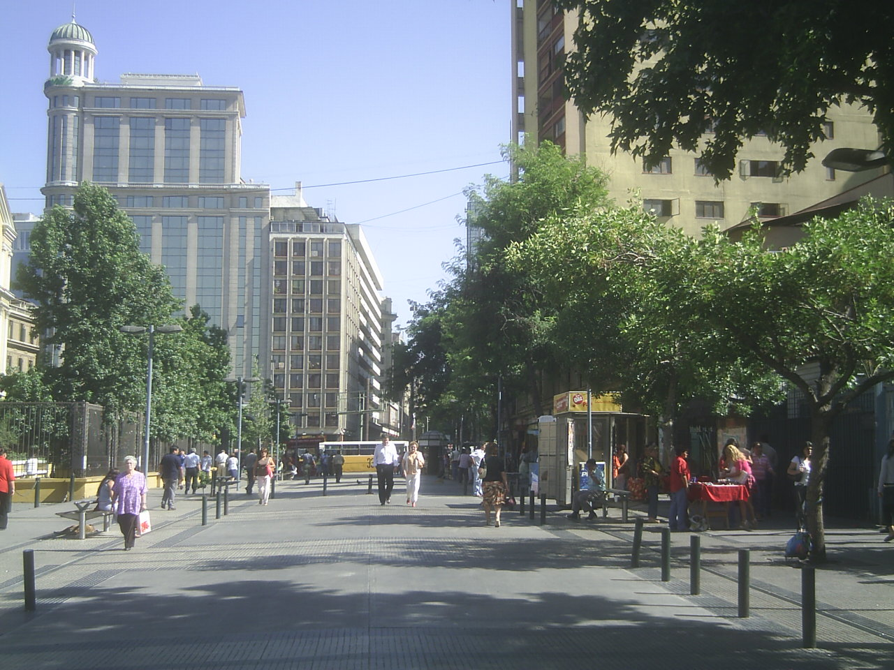 Calle Arturo Prat en Santiago de Chile, por Auztrel.